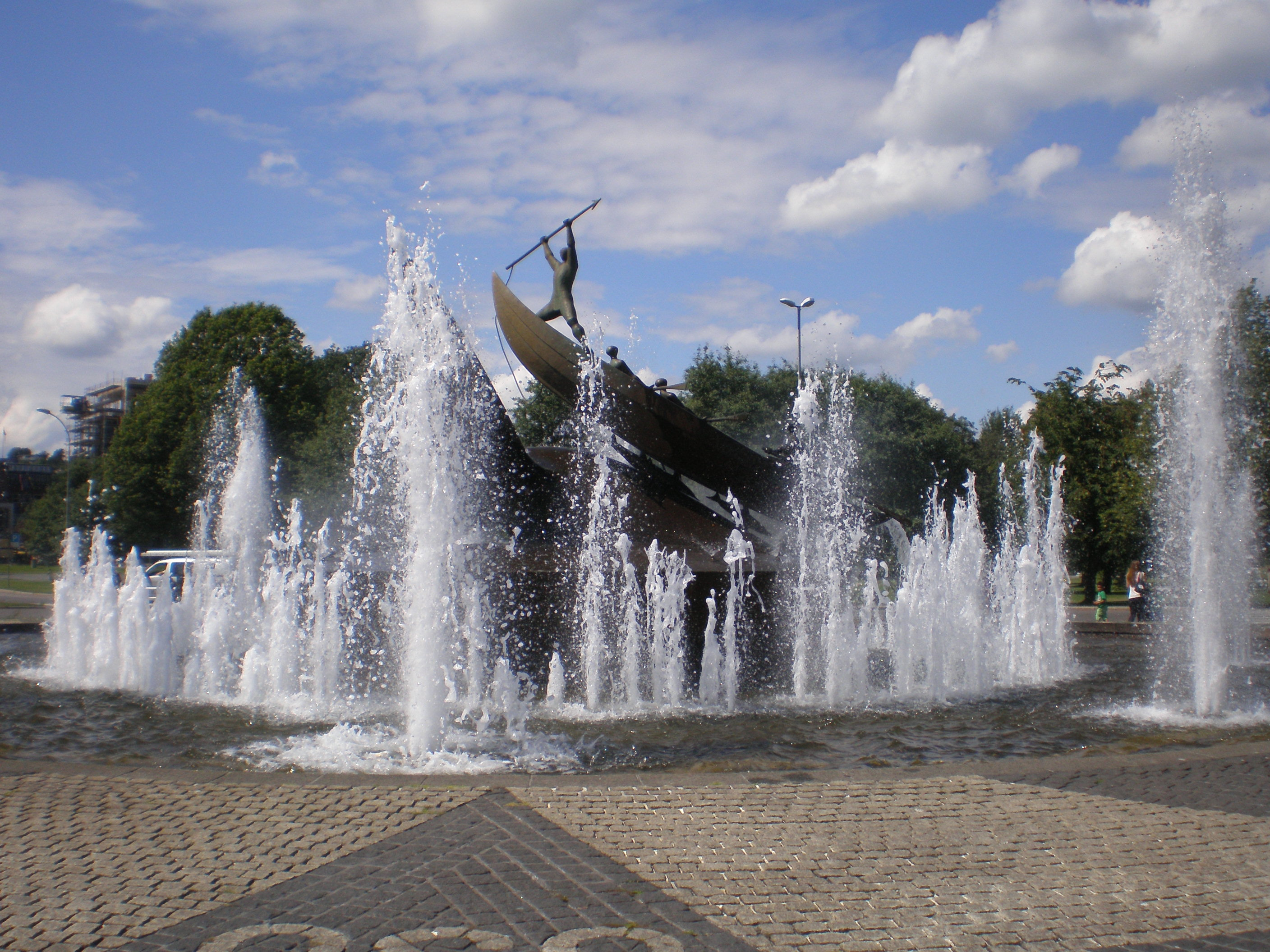 Sandefjord, Norwegia